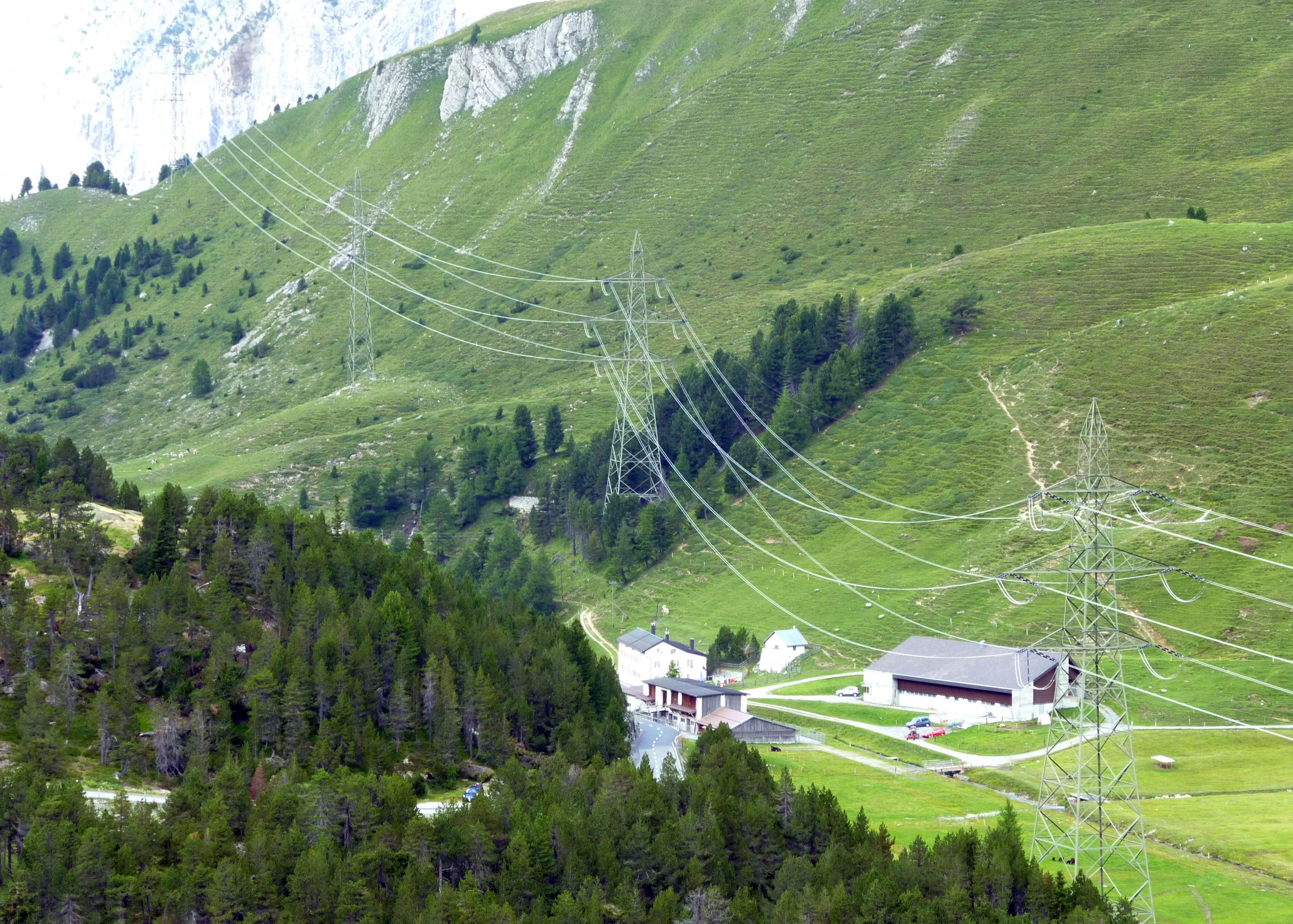 Alp Weissenstein am Albulapass